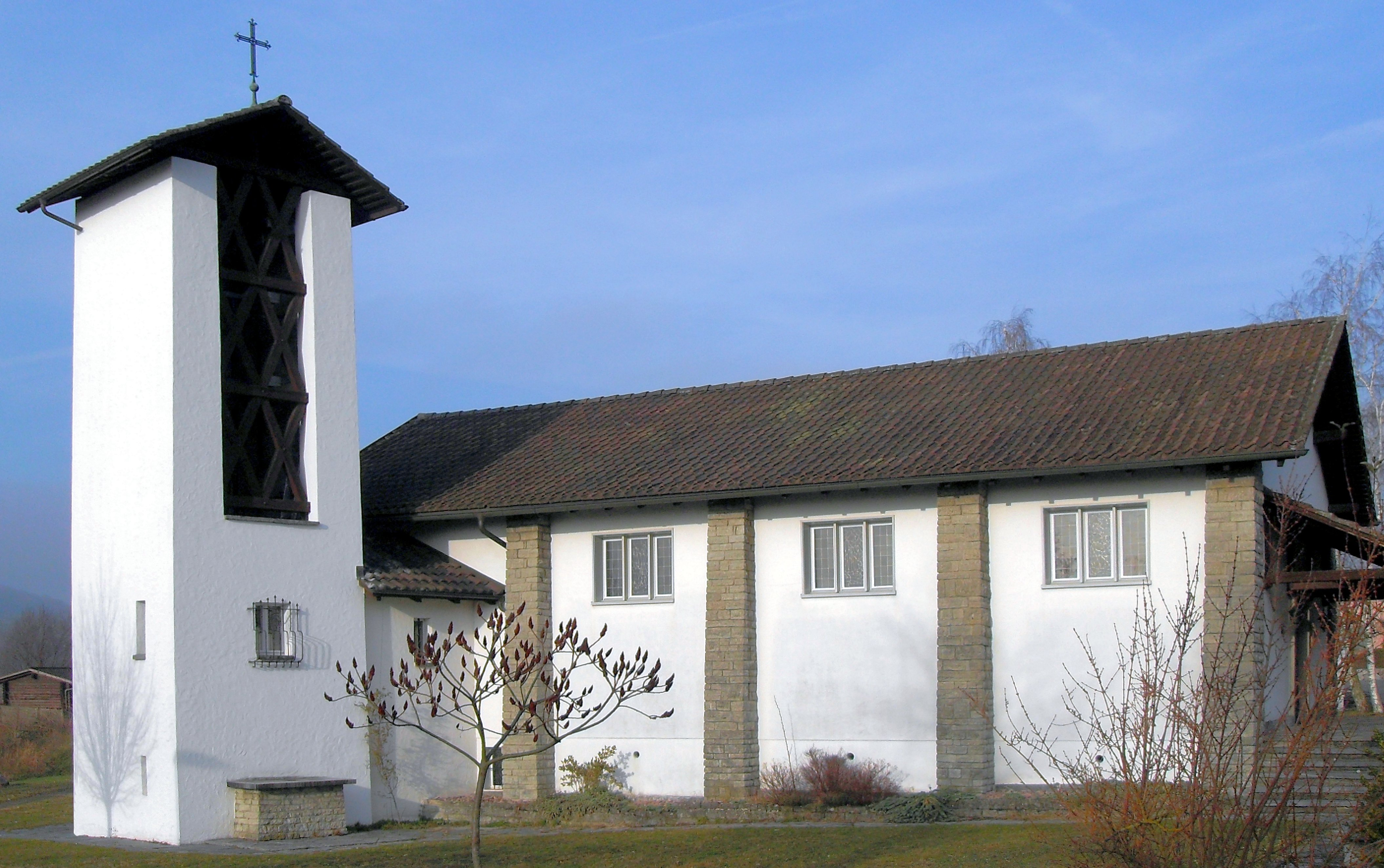 Bruderklausen-Kapelle in Etzgen, Kanton Aargau, Schweiz